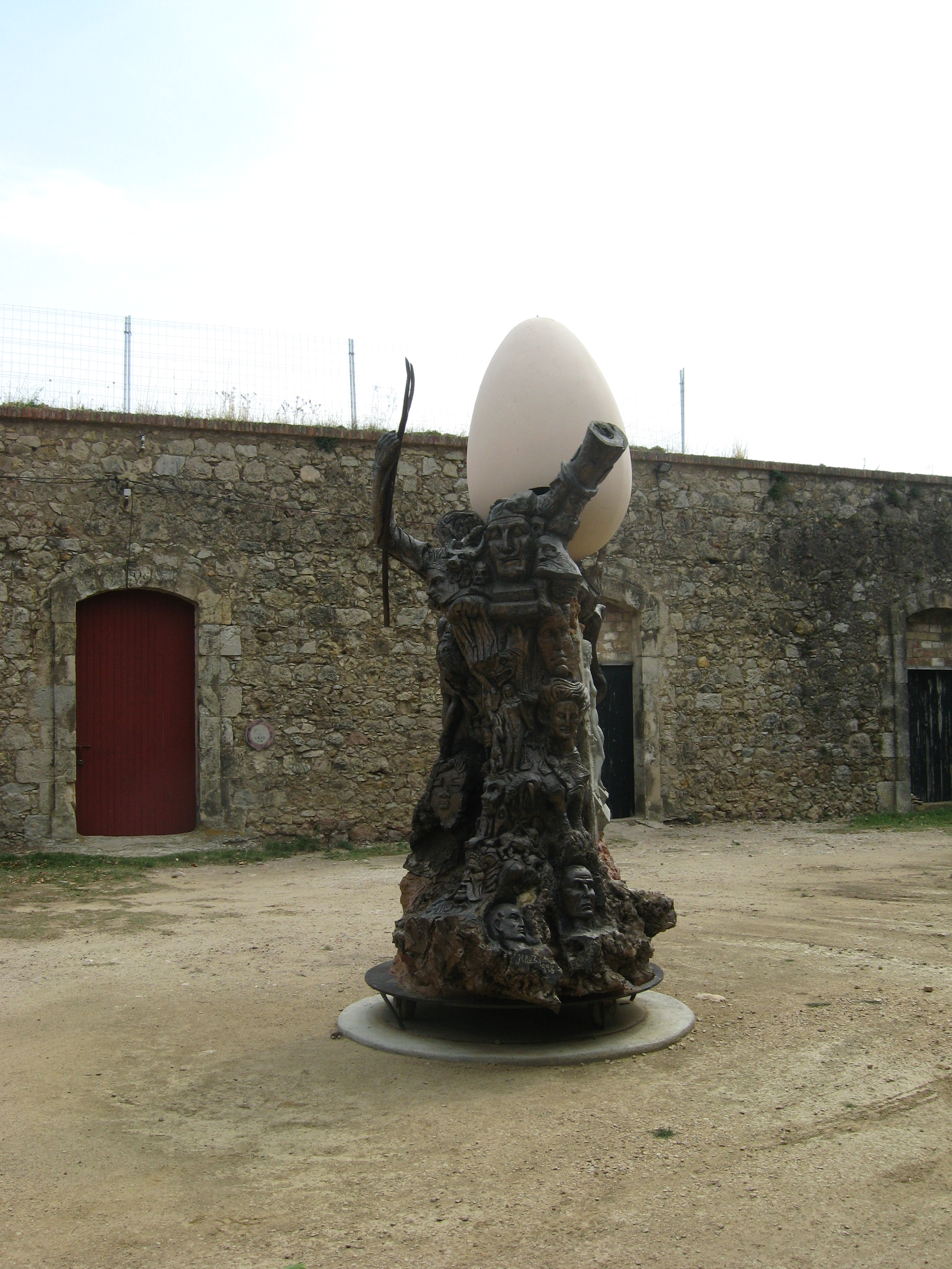 Skulptur im Kastell von Sant Ferran (Figueres/Katalonien) - als Hommage an Salvador Dali, der 1927 im Kastell von Sant Ferran Militärdienst geleistet hatte Datum: 16.09.2010 Urheber: Michael Pfeiffer alias Benutzer:Gordito1869 Quelle: privates Fotoarchiv des Urhebers